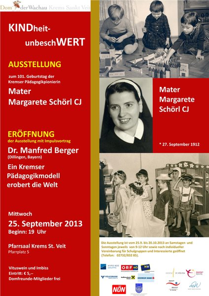 Ausstellungsplakat zur Mater Schörl und ihre Pädagogik